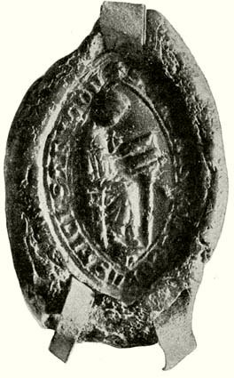 Sixtus esztergomi olvasókanonok pecsétje 1272-ből